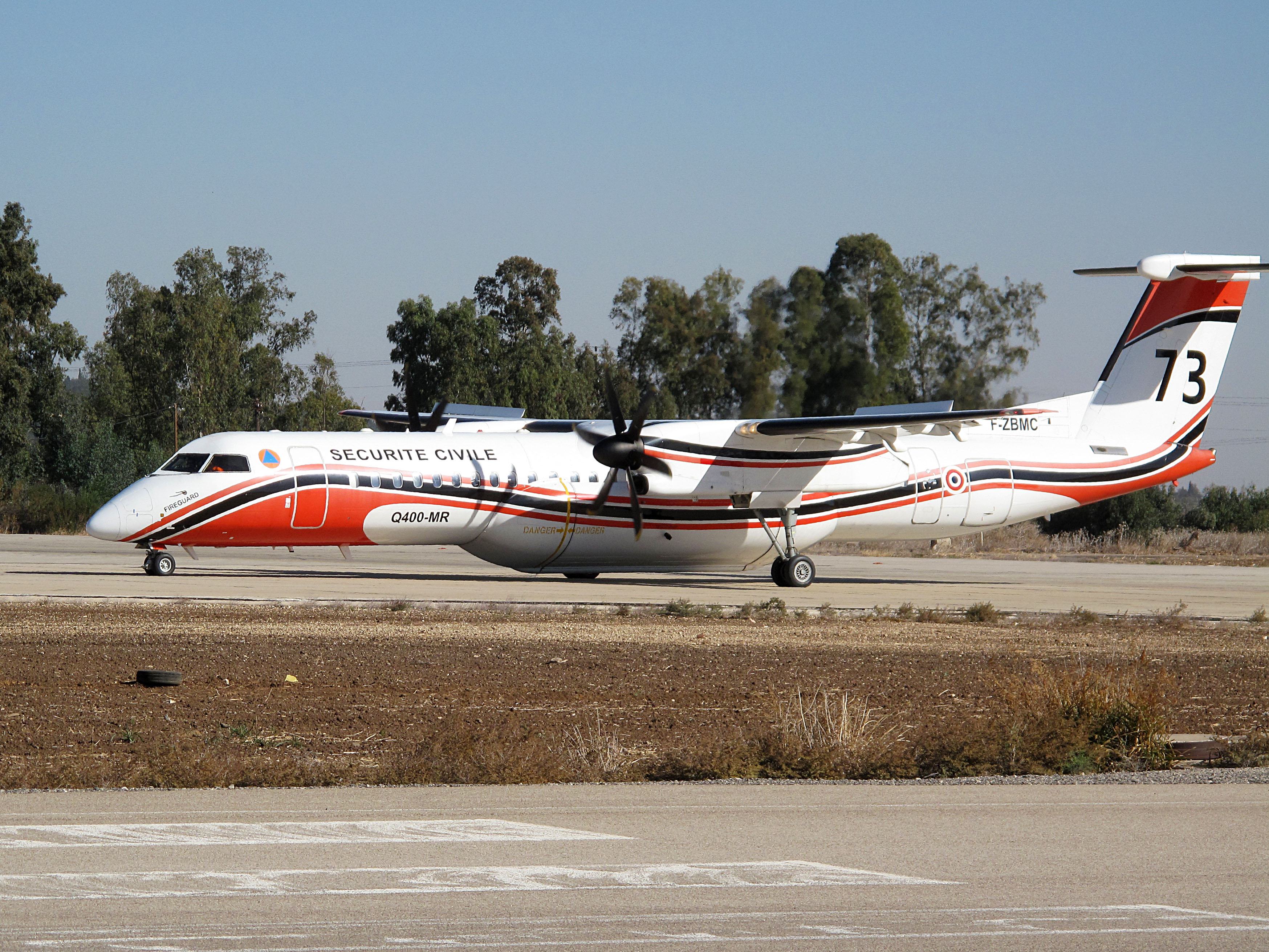 December 4, 2010. A French fire fighting plane (Bombardier Dash-8) preparing for takeoff on another fire-extinguishing flight from an IAF base in northern Israel. מטוס הכיבוי הצרפתי (מסוג דאש-8) מתכונן להמראה מבסיס חיל האוויר בצפון הארץ לגיחת כיבוי נוספת מעל הכרמל.